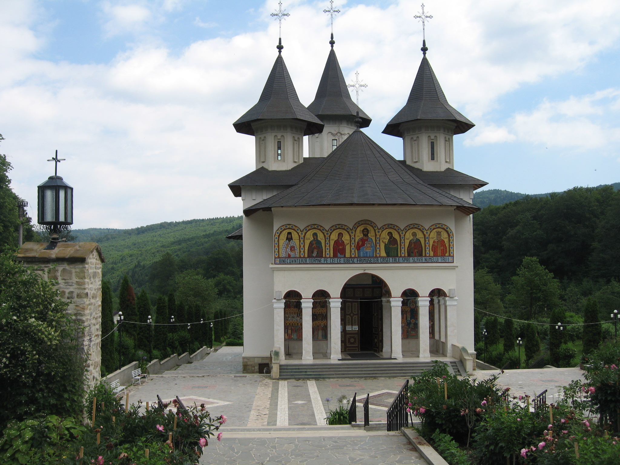 Mănăstirea Sihăstria